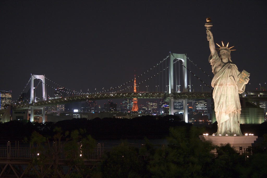 Tokyo 2006 - Rainbow Bridge, Tokyo Tower e replica della Statua della Libertà visti da Odaiba